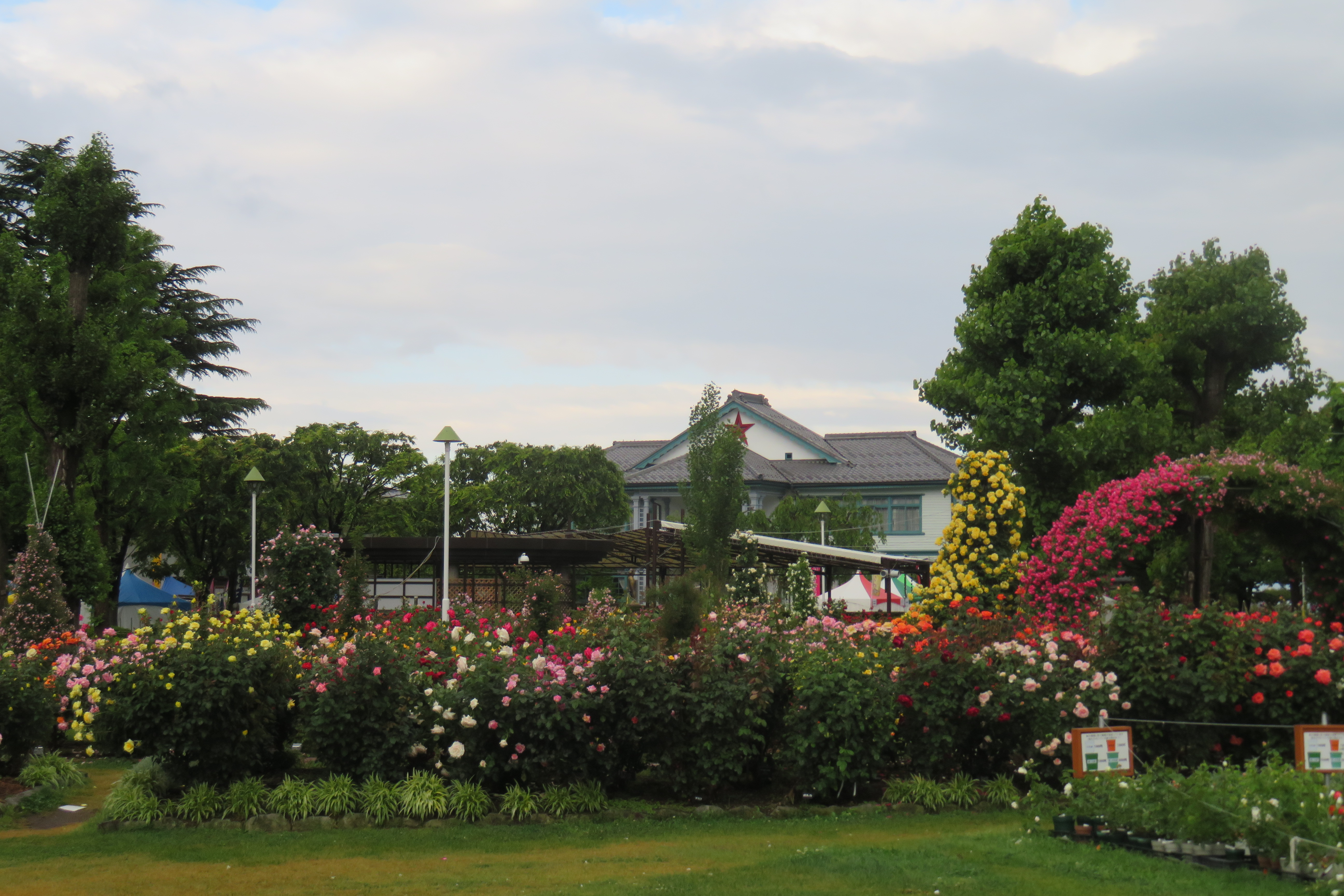 一本木公園（バラ公園）